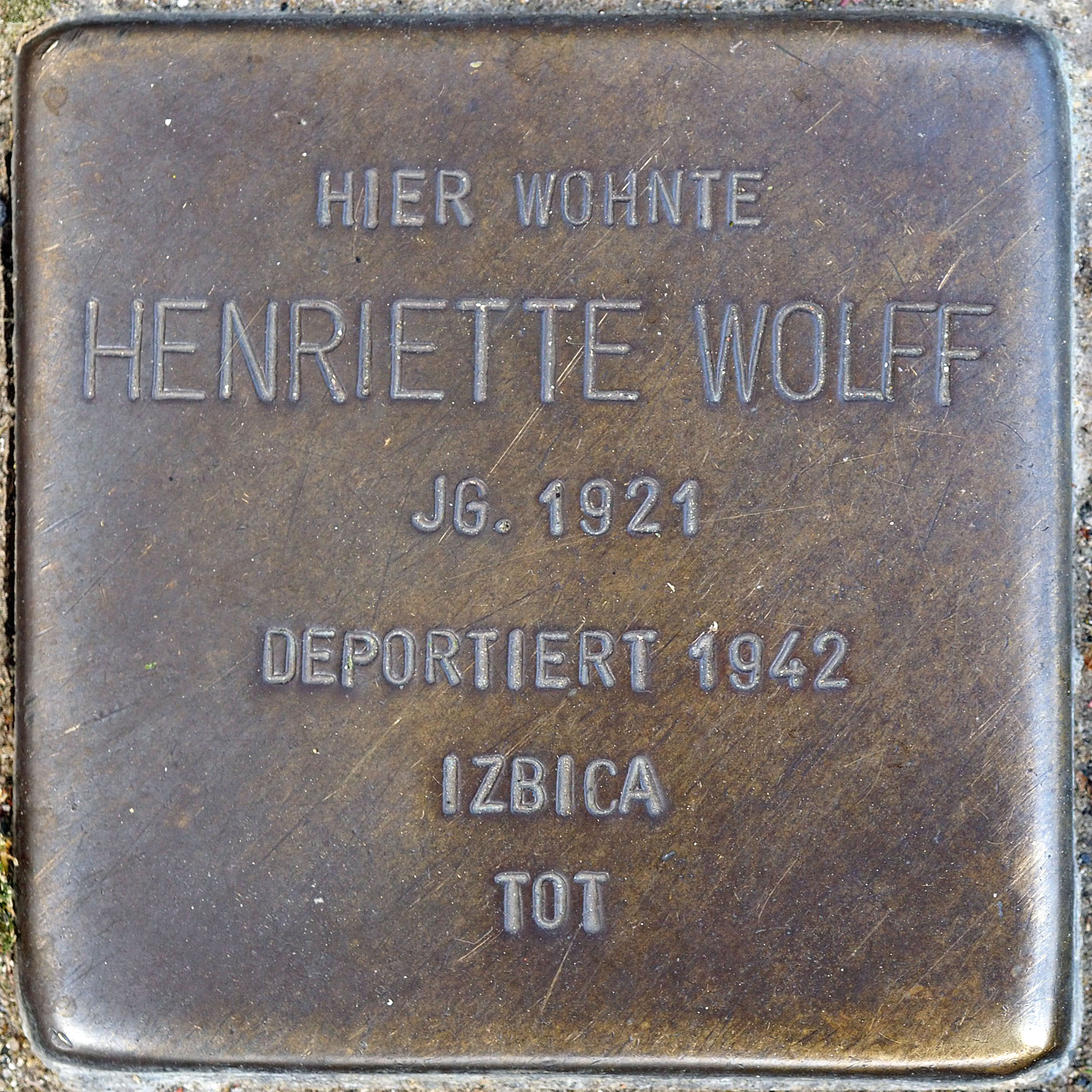 Stolpersteine MG: Wolff, Henriette